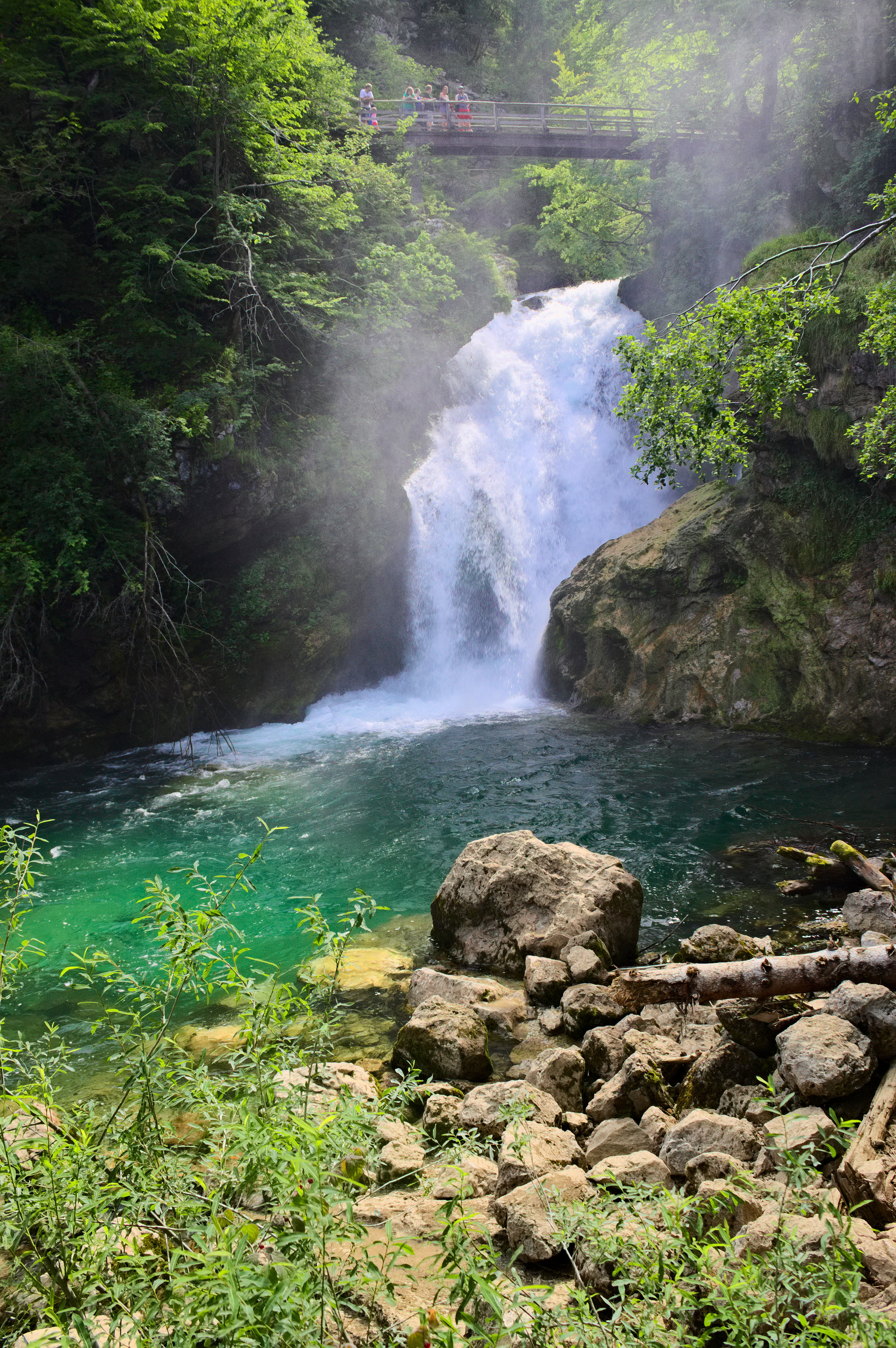 La gorge de Vintgar fut découverte en 1891 par Jakob Žumer, maire de Gorje, et par Benedikt Lergetporer cartographe et photographe. Ils y trouvèrent une nature tellement splendide qu'ils décidèrent de fonder un comité d'aménagement du site. La gorge fut ainsi aménagée pour les visites. L'inauguration publique eut lieu le 26 août 1893. La gorge de Vintgar, longue de 1,6 km, est creusée entre deux montagnes escarpées, Hom et Boršt. La rivière Radovna avec ses cascades, ses parties calmes et profondes et ses rapides vient y ajouter son charme. Le chemin mène les visiteurs par des ponts et les galeries de Žumer, et se termine par un dernier pont en surplomb de la puissante et rugissante cascade de Šum, haute de 16 mètres.